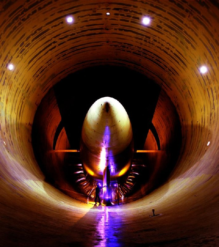 Windtunnel im Langley Research Center der NASA